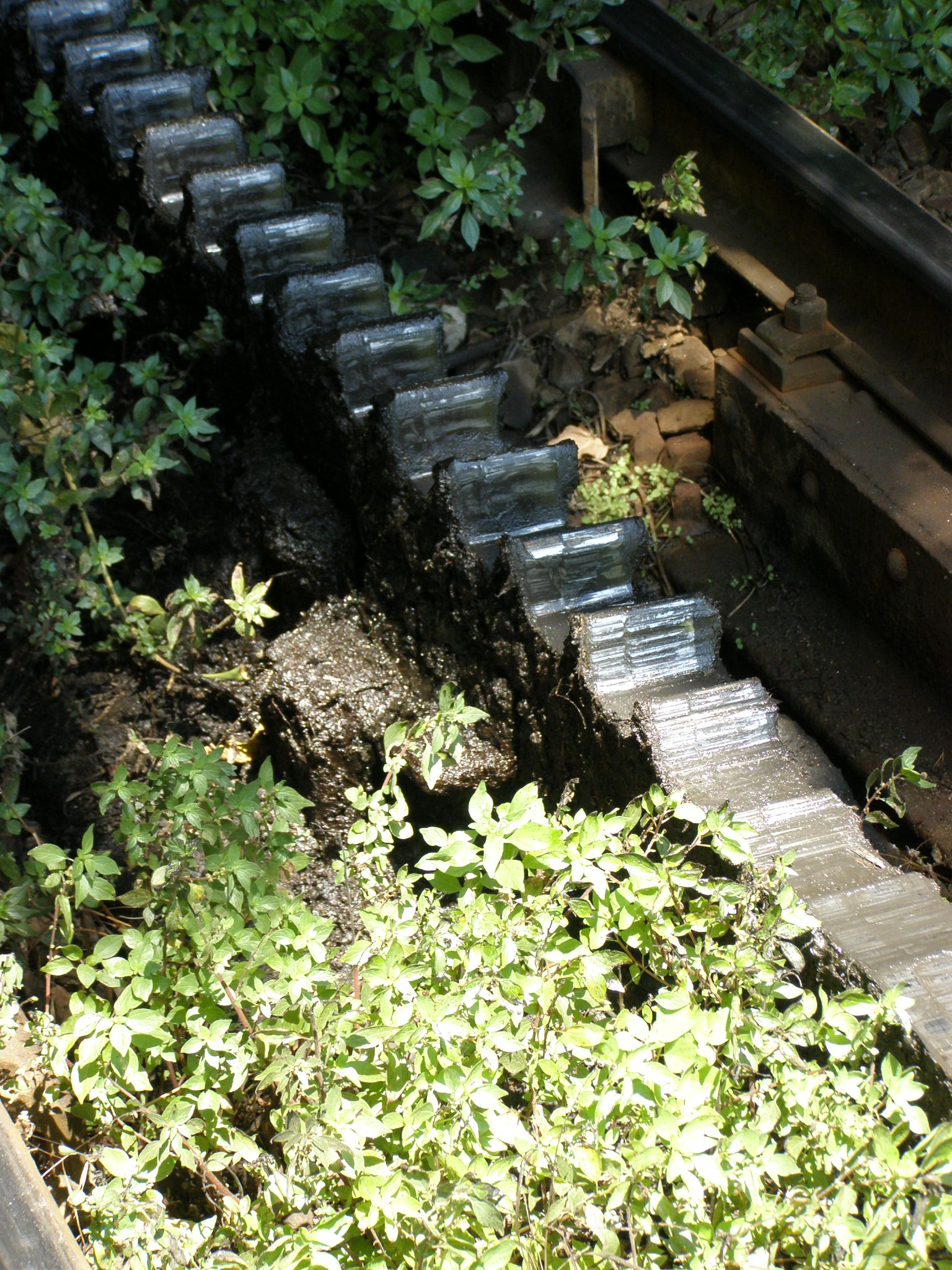 Cremagliera di Catanzaro, all'entrata di Sala